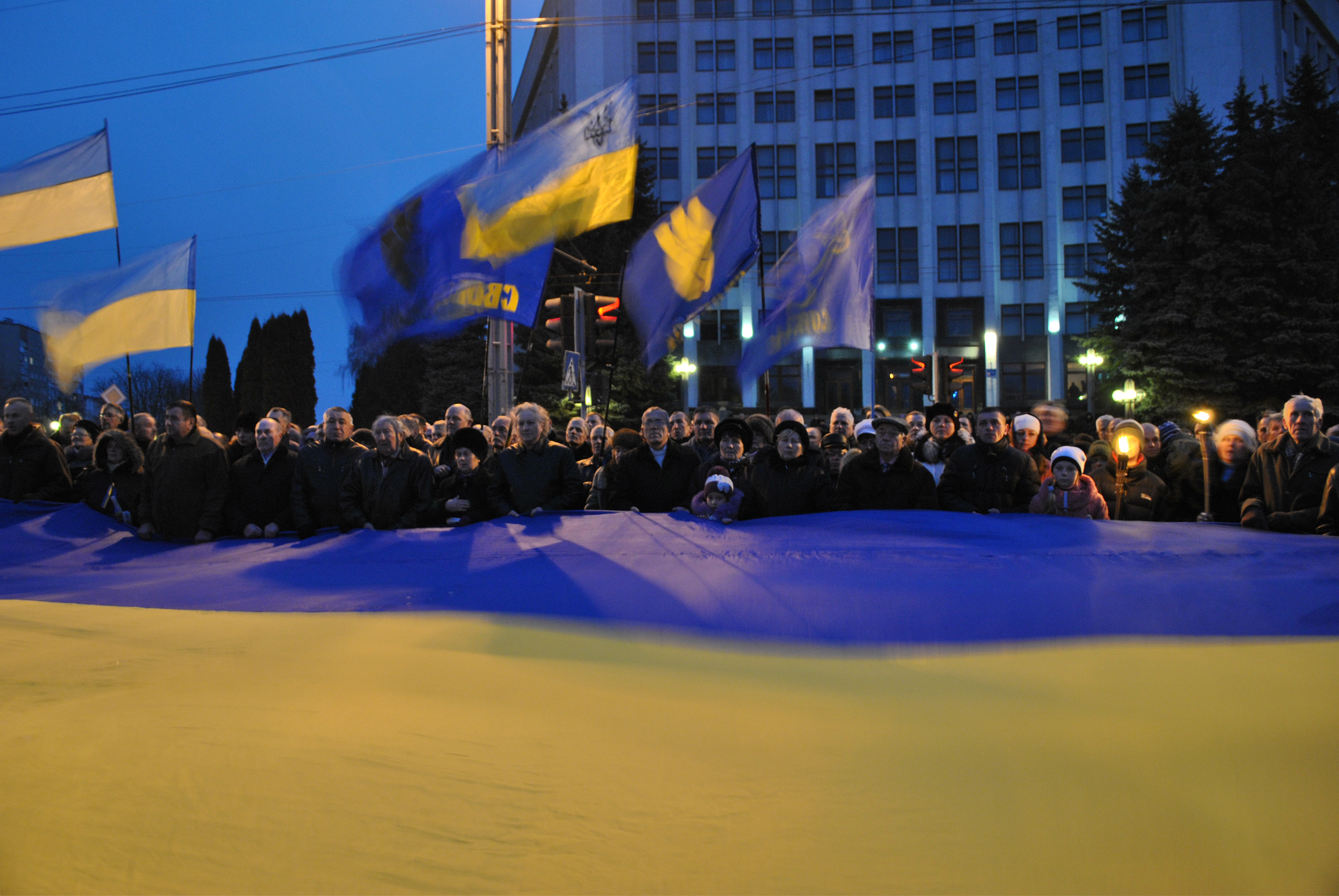 Мітинг біля пам'ятника Степанові Бандері в Тернополі у 105-ту річниці від дня його народження.